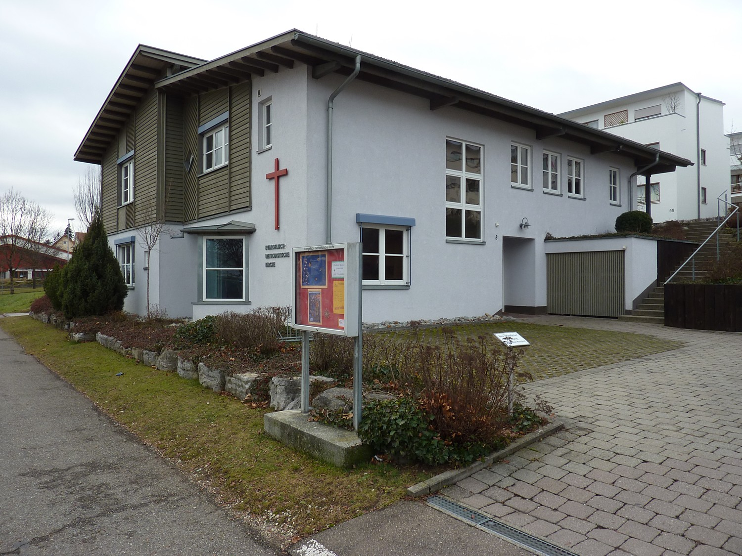 Evangelisch-methodistische Kirche, In der Raite 8, Eningen unter Achalm, Baden-Württemberg